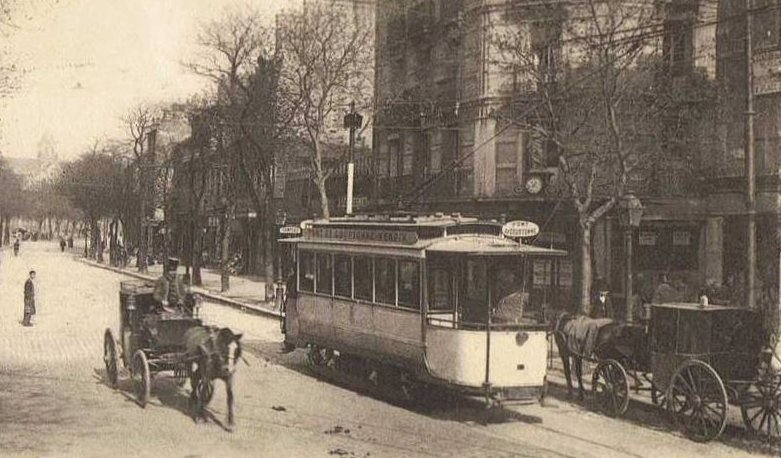 Détail de la carte postale ancienne éditée par LL, n°71 : CAEN - Boulevard Saint-Pierre : Tram de la ligne 3, boulevard Saint-Pierre (actuellement boulevard des Alliés) à Caen